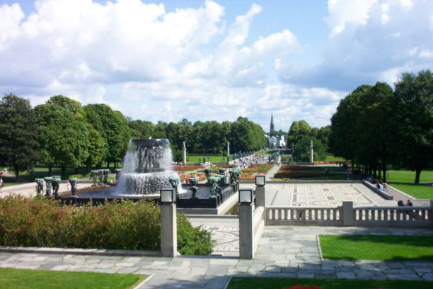 Vigelandspark